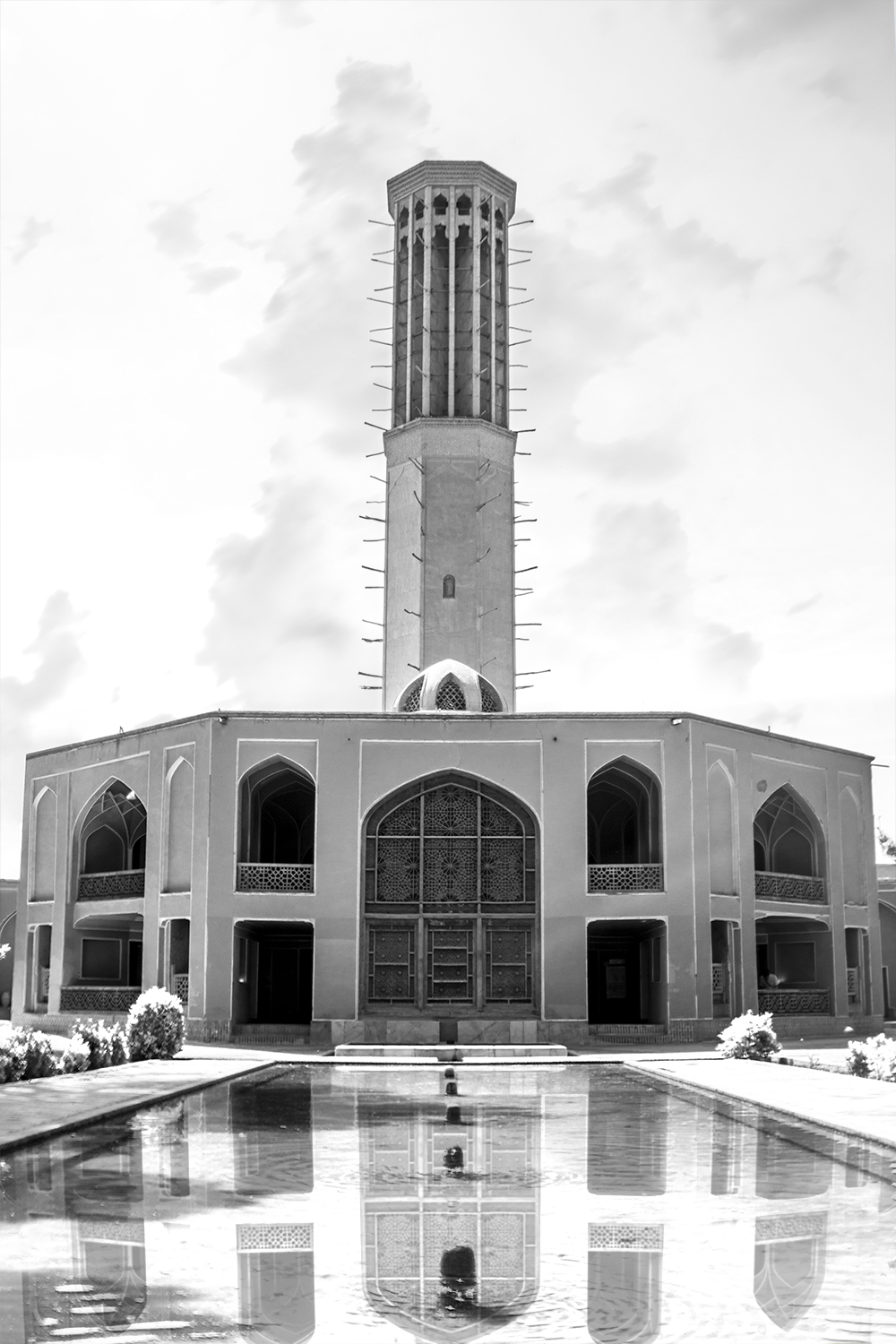 باغ دولت‌آباد در یزد در اواخر دوره افشاریه و در سال ۱۱۶۰ ه‍.ق توسط محمد تقی خان بافقی معروف به (خان بزرگ) که وی سرسلسله خاندان خوانین یزد بود احداث گردید. مرحوم محمدتقی خان ابتدا قناتی به طول ۶۵ کیلومتر را احداث نمود و آب را از مهریز به یزد و محل کنونی باغ دولت‌آباد رساند و سپس مجموعه حکومتی (دارالحکومه) خو د را بنا کرد. این باغ با مساحتی درحدود ۷۰/۰۰۰ مترمربع شامل ساختمان‌ها، حوض‌ها و آبنماهای بسیاری بوده که در فضای بین آن‌ها باغ‌های با درختان انار و انگور و… باگل‌های فراوانی زینت بخش محیط بوده‌اند.[۳] قنات تاریخی عظیم دولت‌آباد با قدمتی بیش از ۲۰۰ سال از احداث پنج رشته قنات تشکیل شده و از ارتفاعات مهریز سرچشمه می‌گرفته و پس از مشروب کردن بخشی از زمین‌های مهریز و به کار انداختن چند آسیاب آبی و طی بیش از ۵۰ کیلومتر به یزد می‌رسیده و باغ دولت‌آباد را آبیاری می‌کرده. اما این باغ در حال حاضر توسط چاه نیمه عمیق مجاور آبیاری می‌شود.[۴] تقی خان بافقی پدر عبدالرضا خان یزدی و جد سلطانعلی خان وزیر افخم و خانواده‌های افخم ابراهیمی و افخمی است. مدارک مربوط به این موضوع در میان اسناد شخصی خانواده افخم ابراهیمی حفظ و نگهداری گردیده‌است.